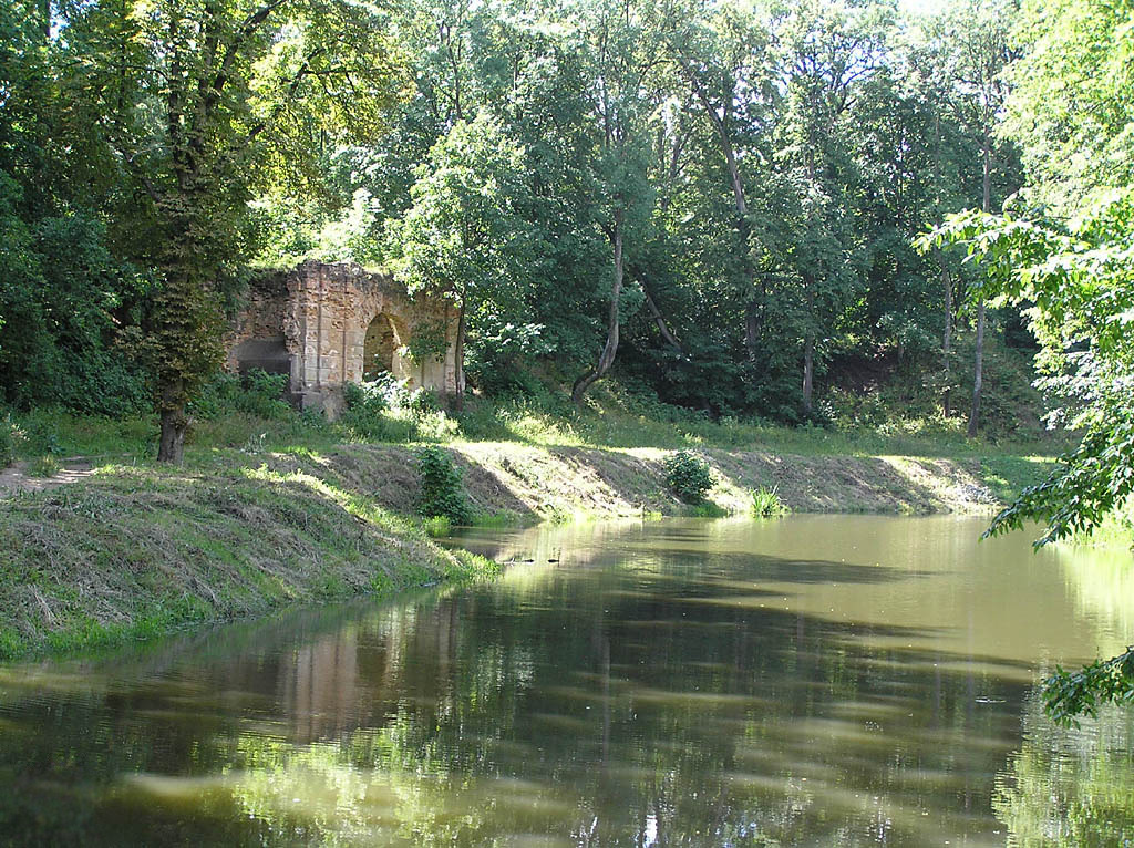 Беларуская (тарашкевіца): Высокае